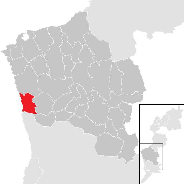 Bezirk Oberwart